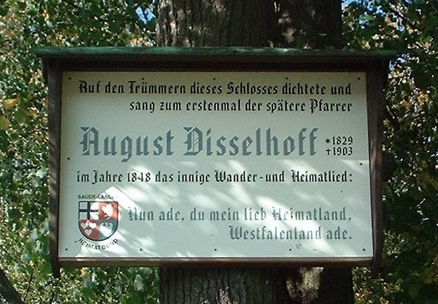 Disselhoff-Gedenktafel auf dem Arnsberger Schlossberg